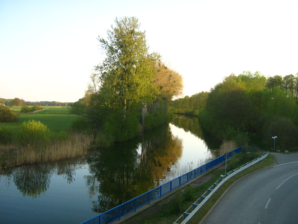 Die Stör an ihrem Anfang in Raben-Steinfeld/Schwerin-Mueß.